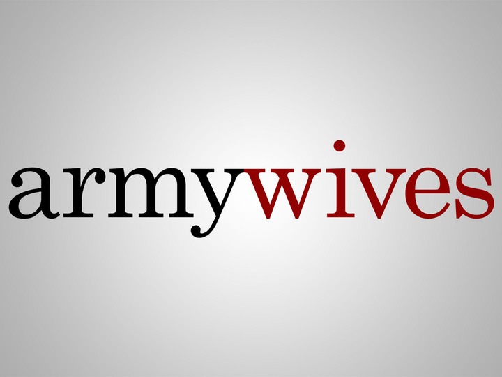 Diese Grafik zeigt das Logo der TV Serie Army Wives